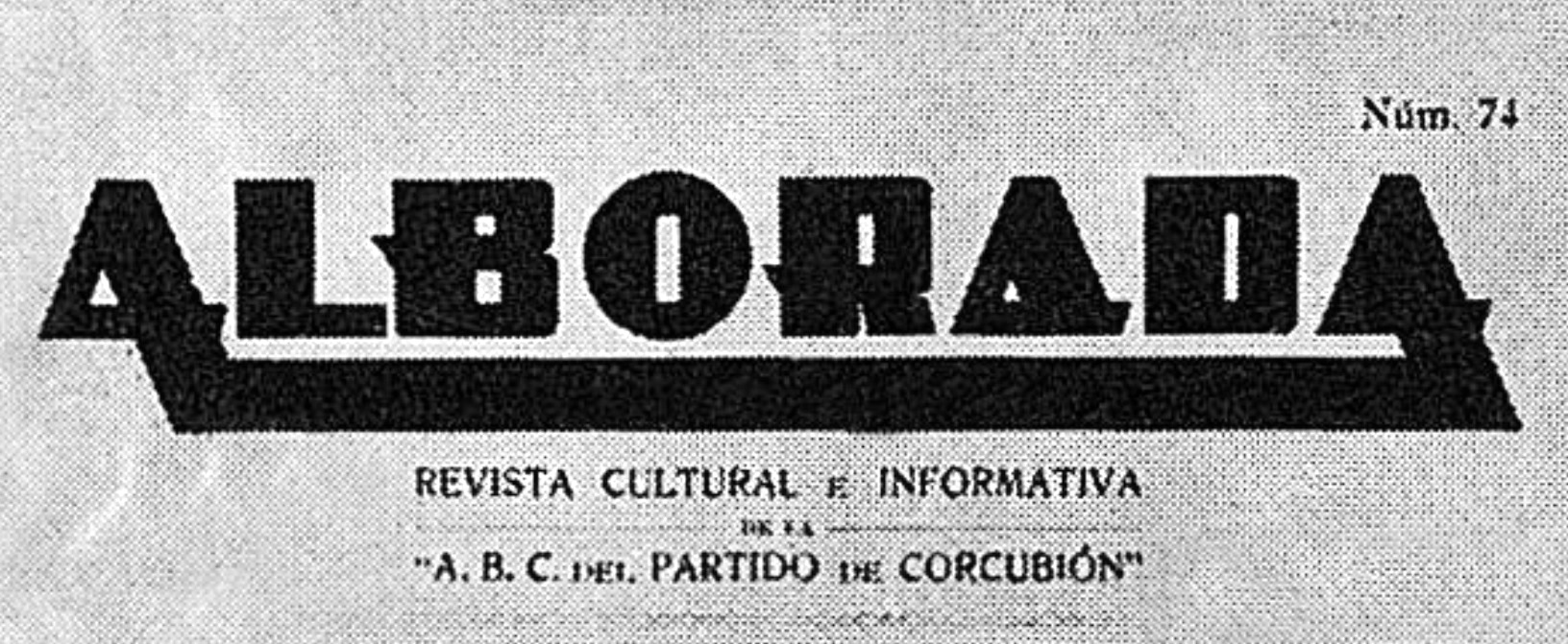 Alborada. Revista cultural e informativa de la Asociación Benéfica Cultural del Partido de Corcubión número 74, 1933